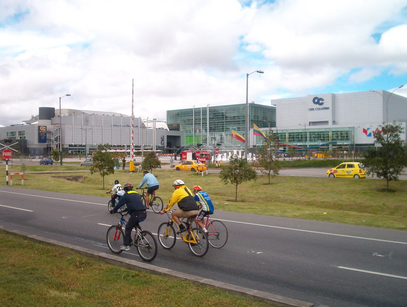 Centro comercial Gran Estacion